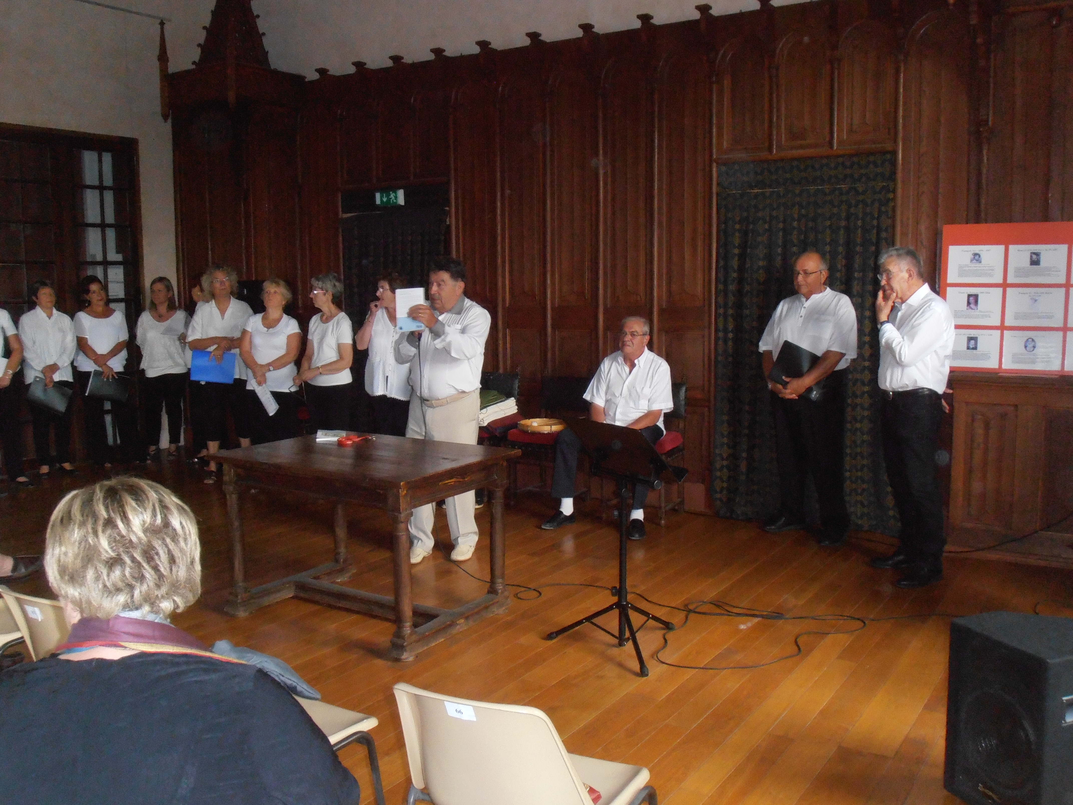 Var, Vins-sur-Caramy. A l’occasion du 30ème anniversaire de l’Association de sauvegarde et d’Animation Culturelle du Château de Vins, à laquelle la chorale de Vins a tenu à s’associer, le 4 juillet 2014, Bernard Lucquiaud présente son livre au public aux côtés de Jean Clotaire Bonnet « Une vie, une passion … et les pierres revivent à Vins (Mémoires) ». L’auteur agrémente l’histoire de Jean Clotaire Bonnet (à droite sur la photo) d’anecdotes contées avec humour, de descriptions précises, évocatrices et poétiques, et de récits historiques bien documentés sur le château et ses occupants. " Une vie, une passion ... et les pierres revivent à Vins" est avant tout un roman à l'adresse du "Grand public". Il poursuit trois objectifs : distraire (une belle histoire, un récit agréable...), instruire (données historiques et / ou techniques), inviter à la réflexion (problématique de la restauration et de la réutilisation, par exemple). Le dosage est très subtil, ni trop technique ni trop érudit, le récit intéressera la grande majorité des visiteurs du château et la population locale sensible à l'aventure de "son" château. L’auteur a parfaitement conjugué l'anecdote drôle et la vérité plus profonde, sans que cette dernière apparaisse trop compliquée, ardue, ou "réservée aux experts", mais sans les frustrer.